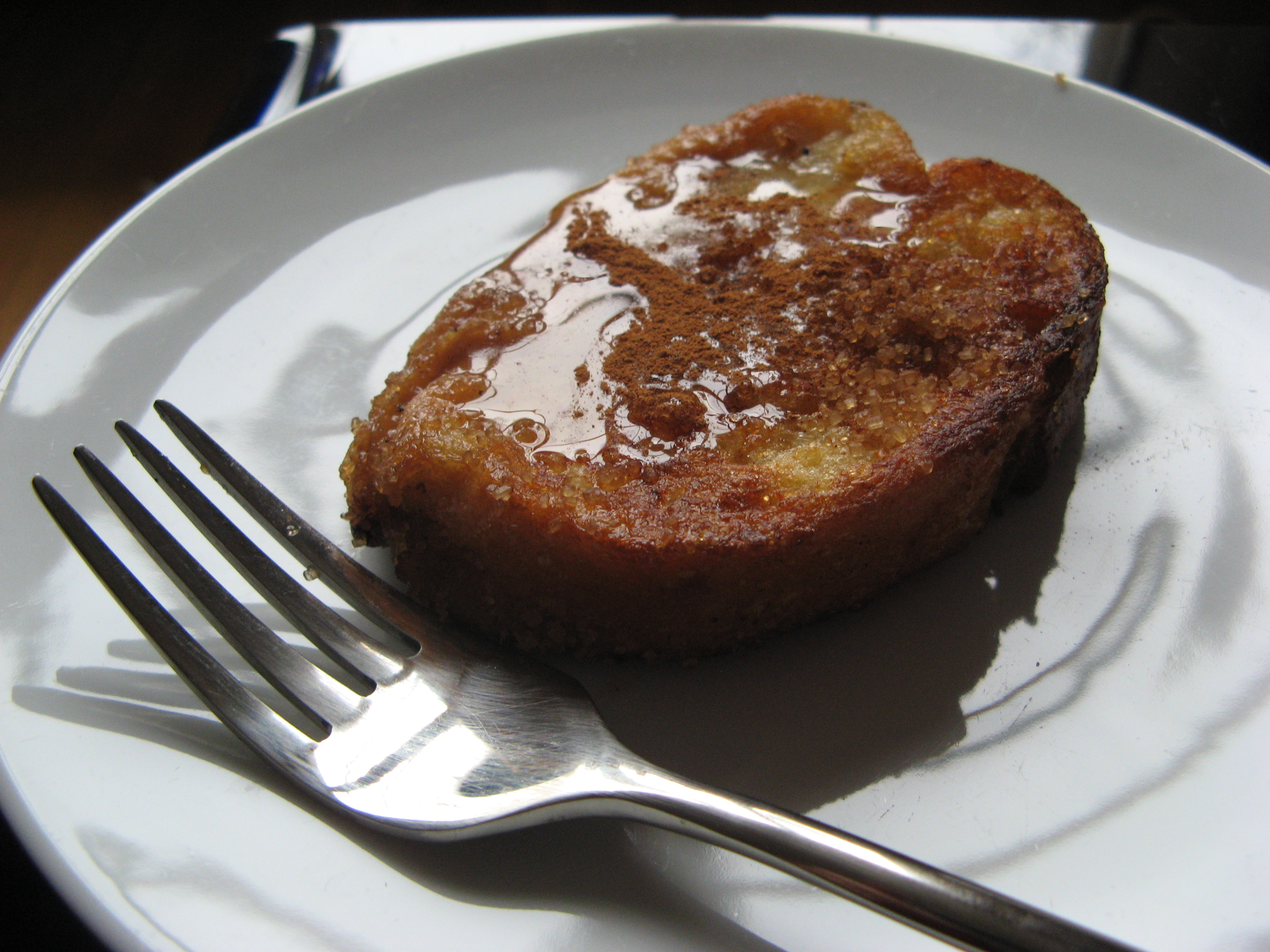 una torrija